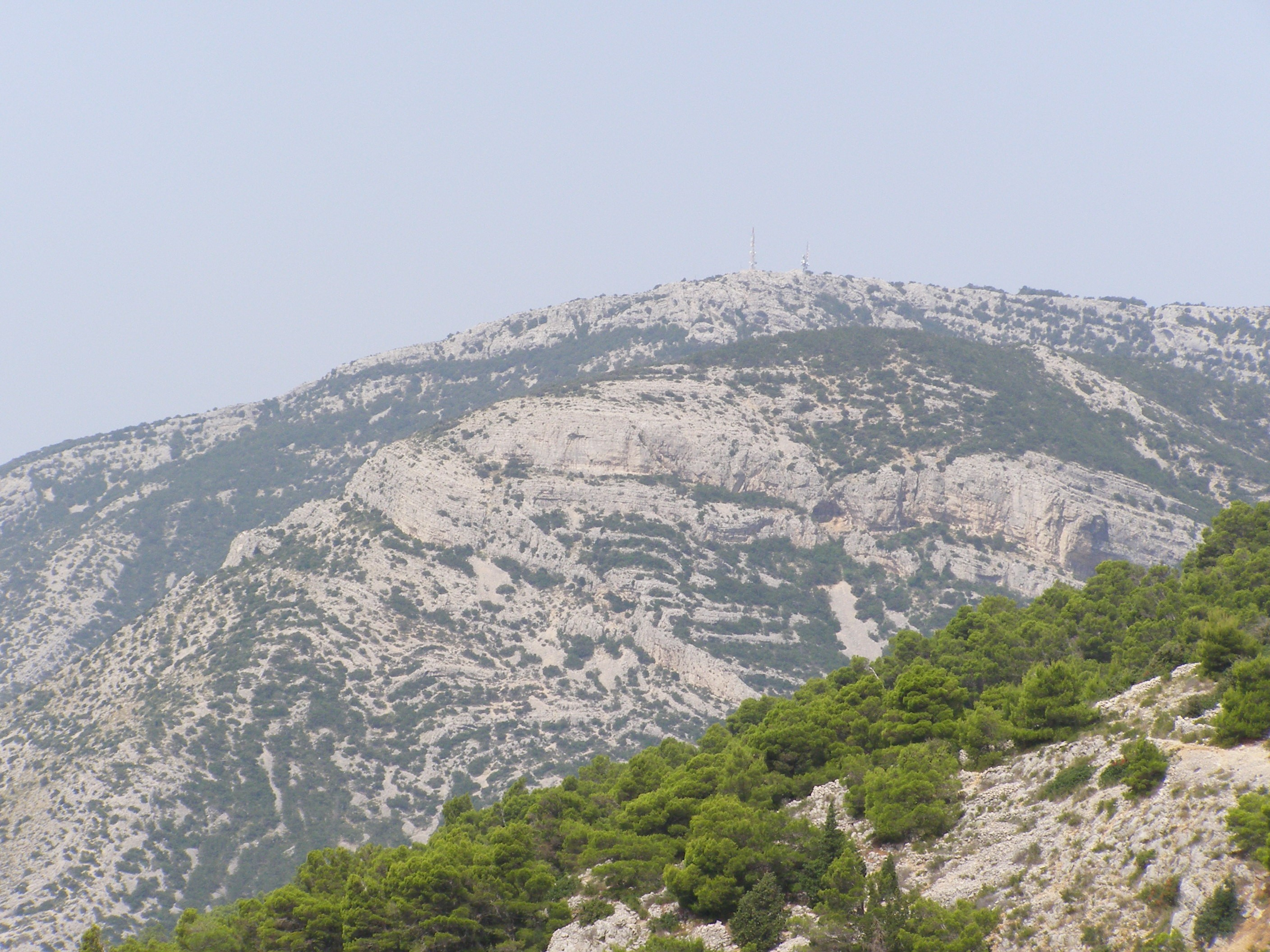 Vidova Gora, Brač, Croatia